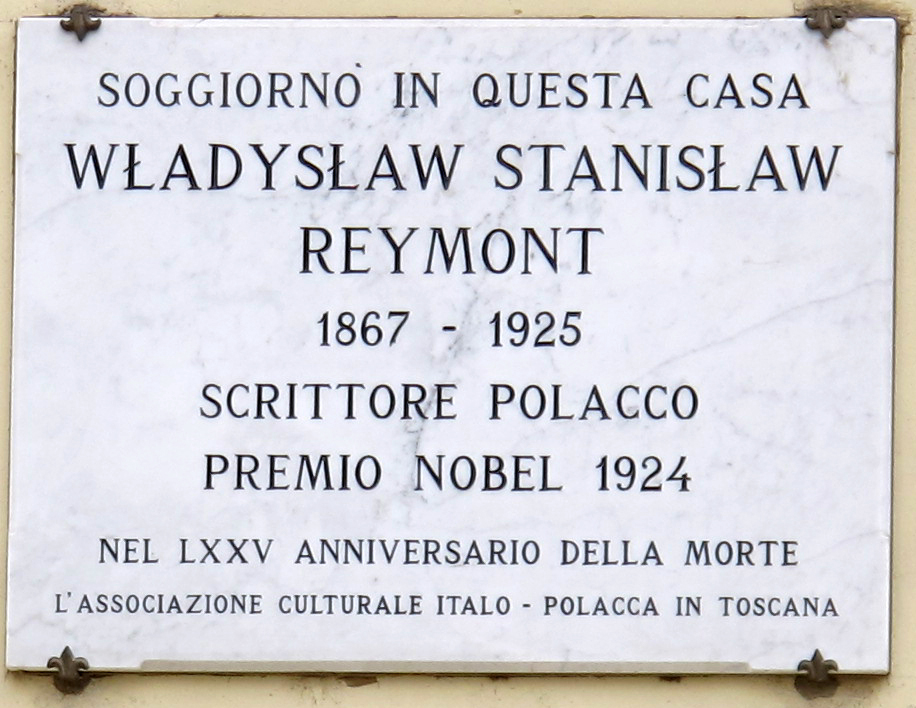 Piazza d'azeglio 9, villino marinelli 02 targa Wladyslaw Stanislaw Reymont 2